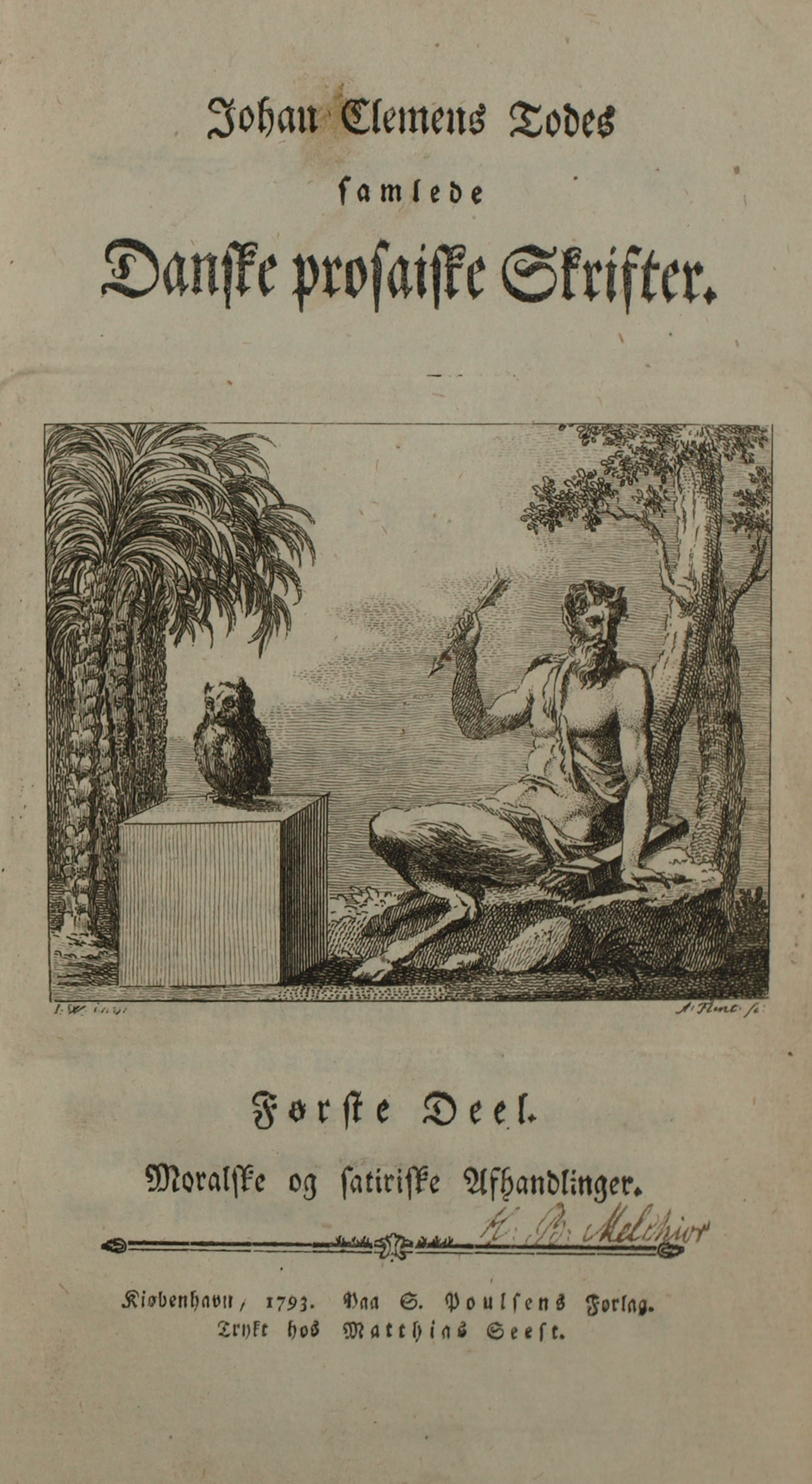 Titelbladet til Johan Clemens Todes Samlede Danske prosaiske Skrifter - Første Deelø, Femte bind af hans Samlede Skrifter. Fra 1793.